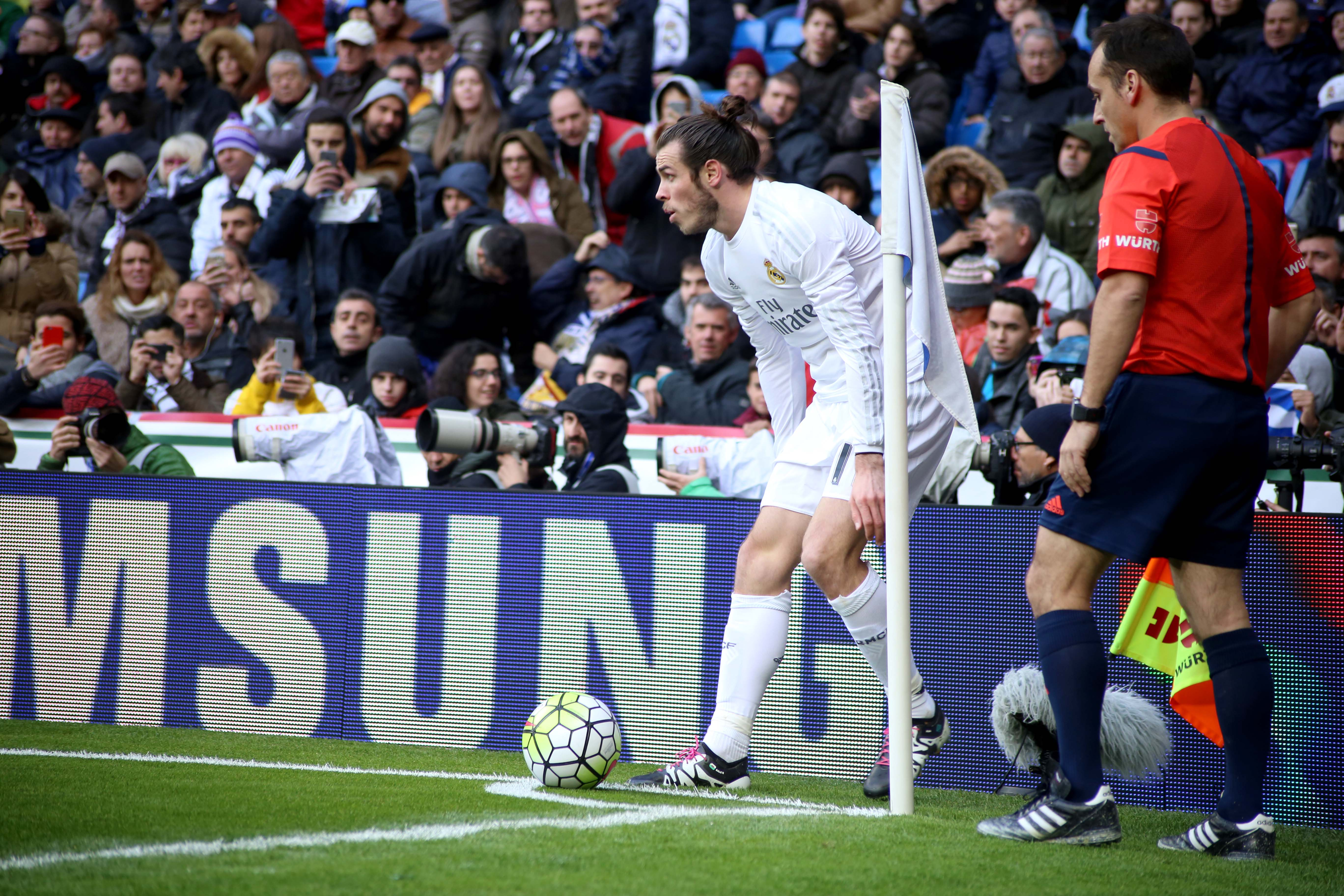 Gareth Bale